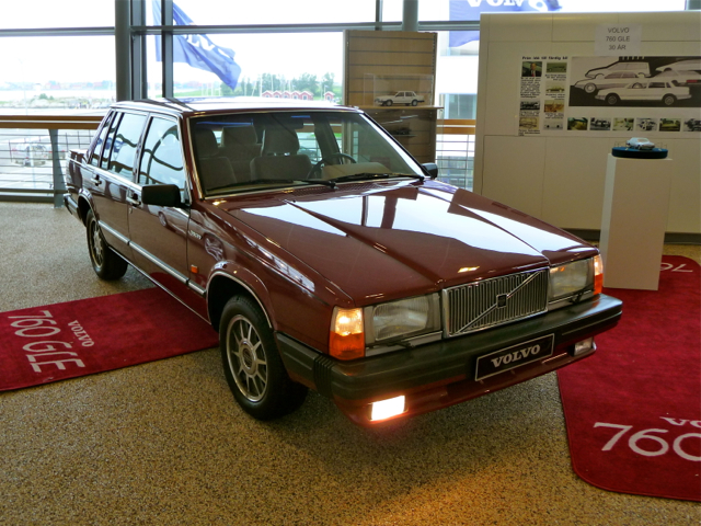 Volvo 760 GLE, Volvo Museum Arendal